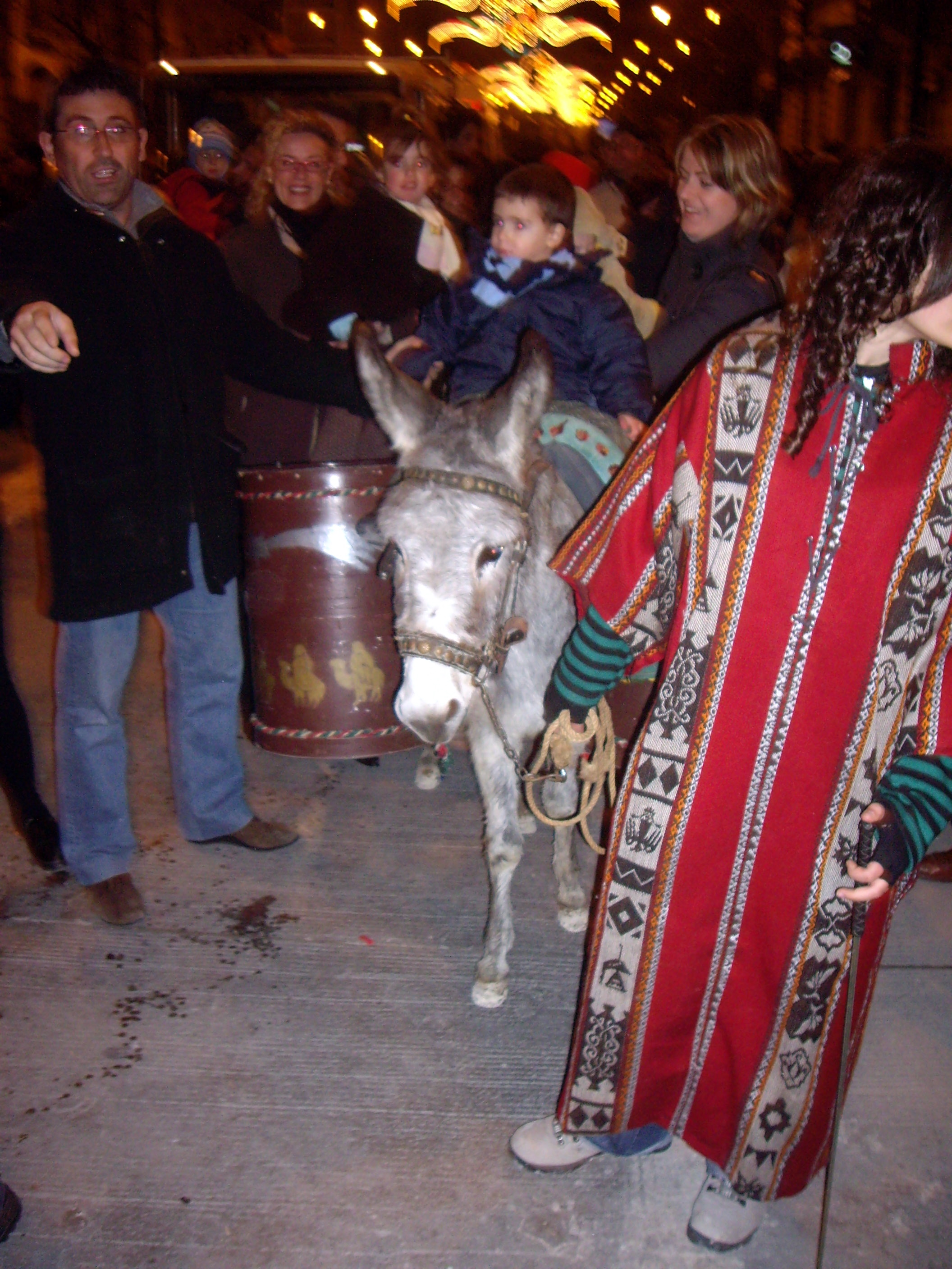 Burreta. Alcoi 4 de gener